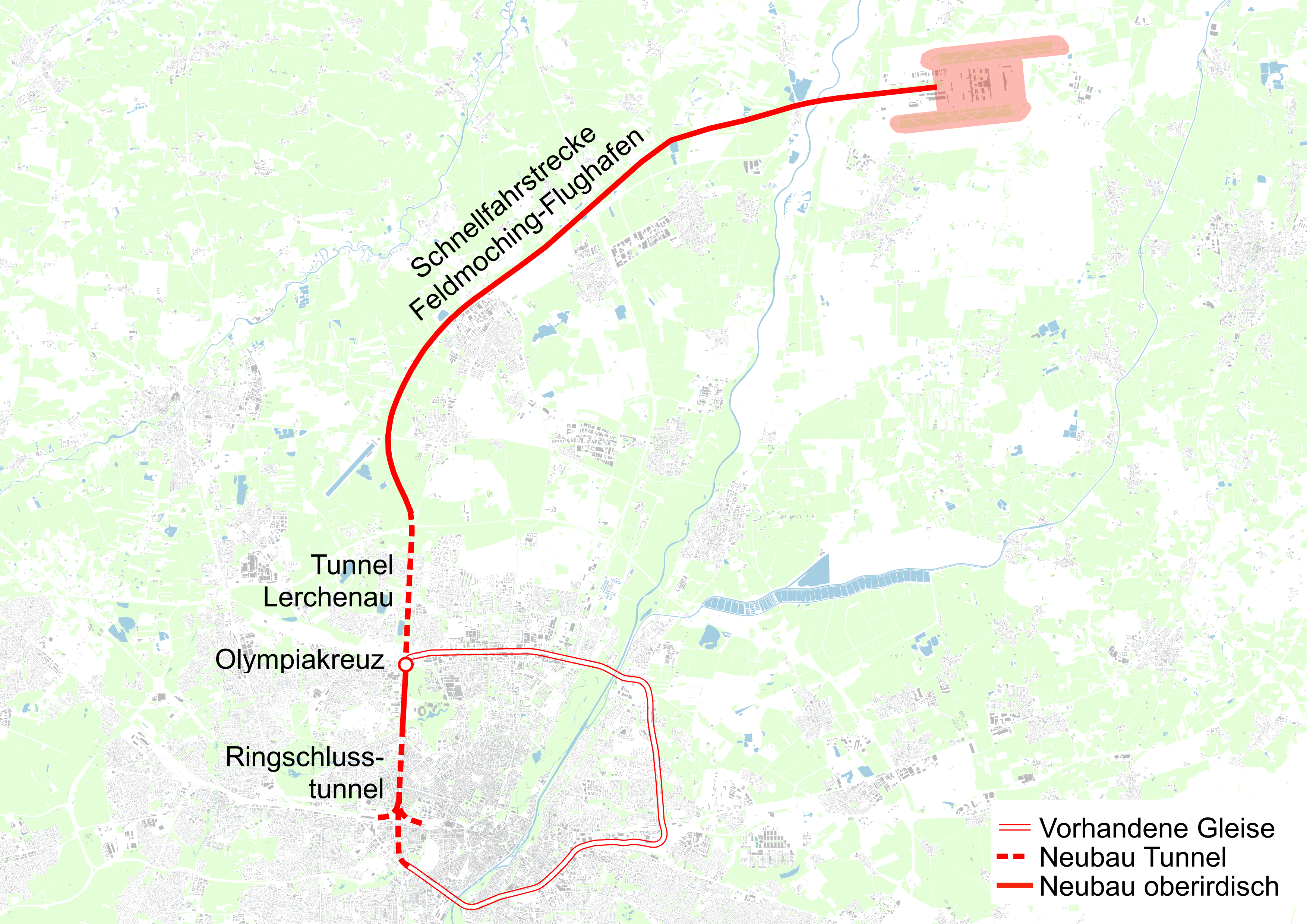 Infrastruktur für Münchner Ringbahn und Flughafenanbindung nach Herzog u. Atabay